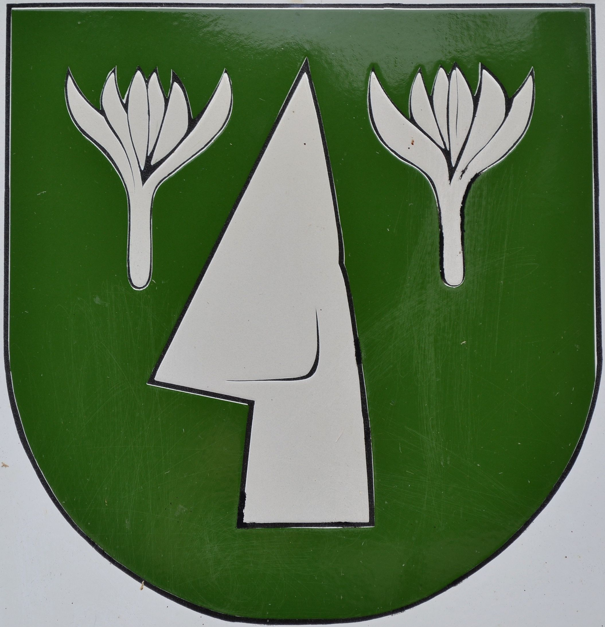 Erb obce Naháč tvorí v zelenom poli strieborný lemeš a dve strieborné štylizované rastliny jasienky obyčajnej (Colchicum autumnale L.), ľudovo zvanej naháč (podľa nej má obec svoje meno)